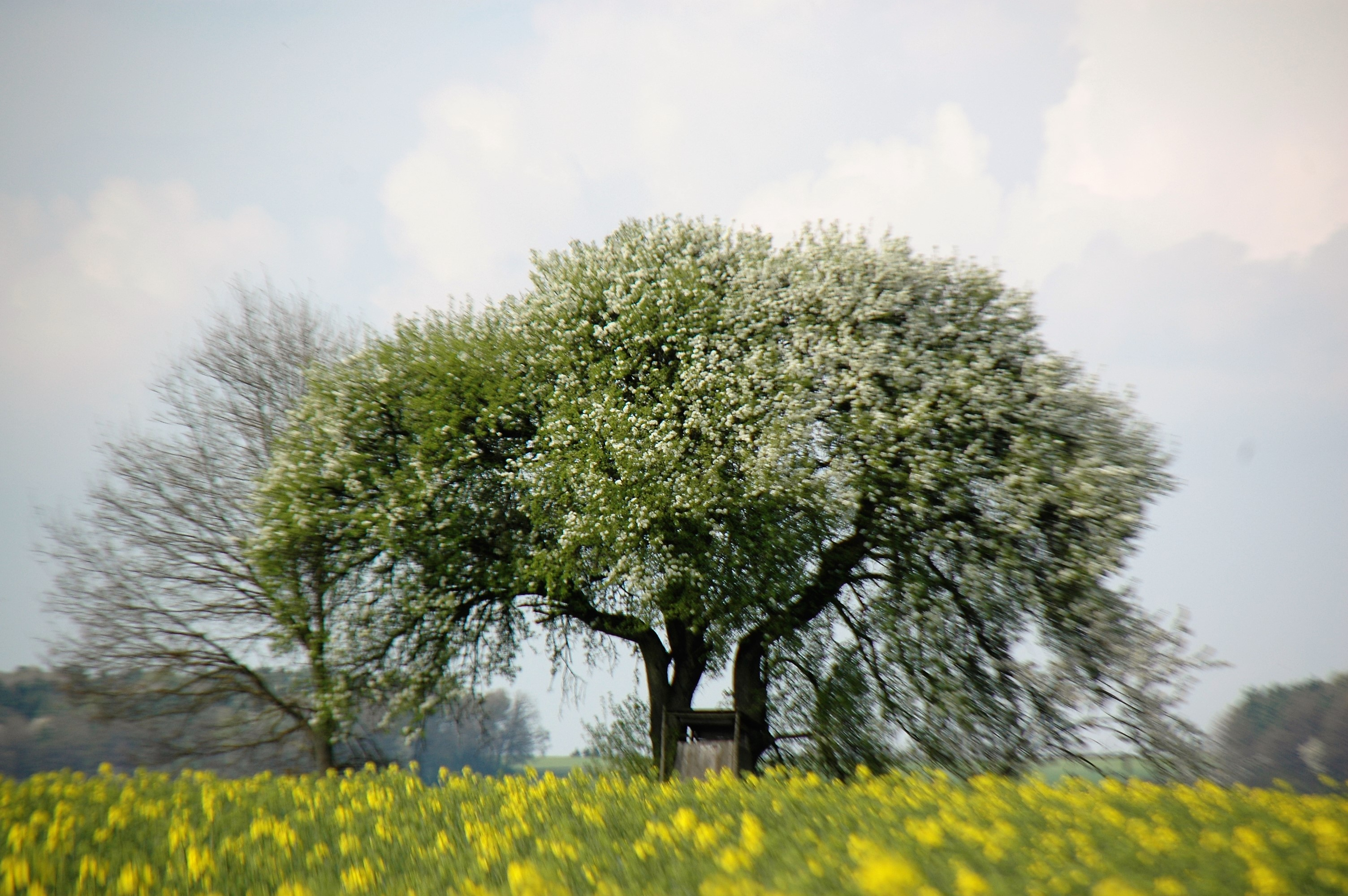 Blühender Baum Landschaftssschutzgebiet Ammerbachtal - Amberg, Opf. Segelflugplatz Fuchsstein-Ammerthal, Bayern, Deutschland